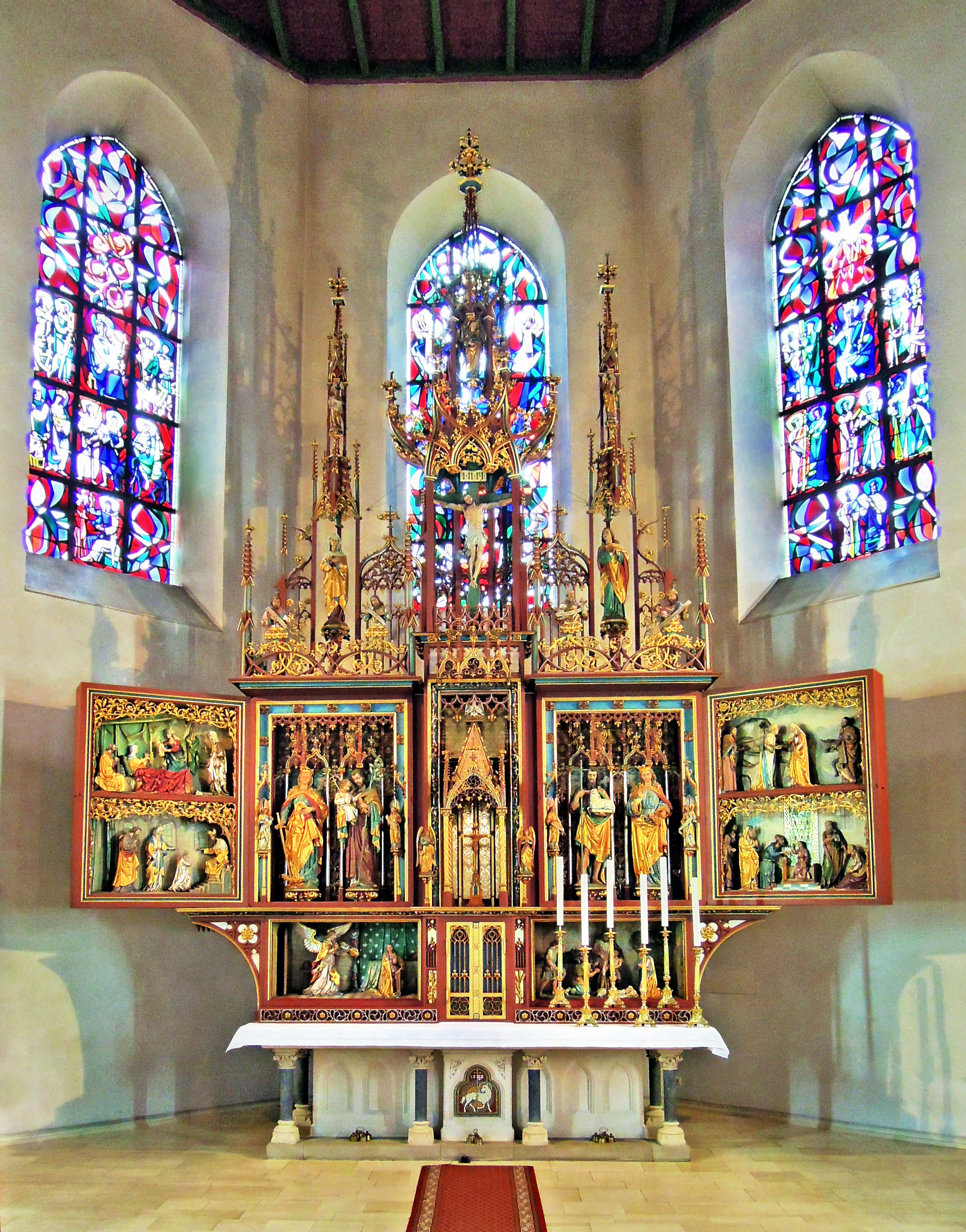 Donatusstraße, Hochaltar mit Figuren des 18. Jh. in der kath. Pfarrkirche Maria Himmelfahrt, 1899 von C. Frank (Einzeldenkmal)